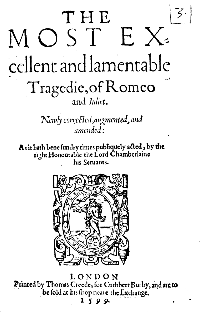 Η πρώτη σελίδα από το δεύτερο Quarto του έργου Romeo and Juliet (1599).